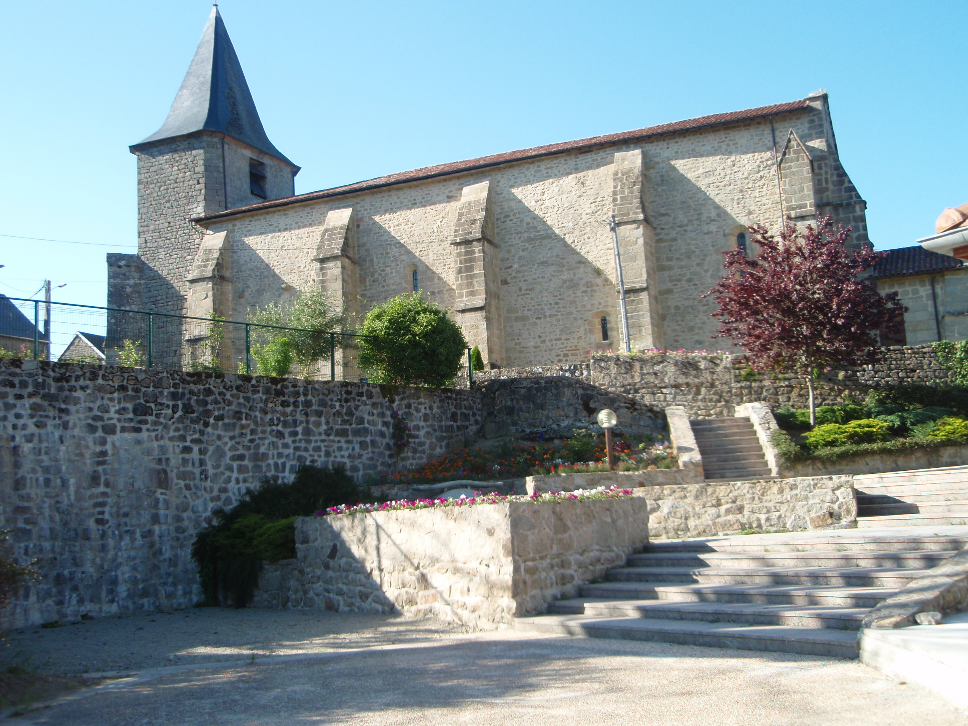 Royère de Vassivière Église Saint-Germain vue arrière